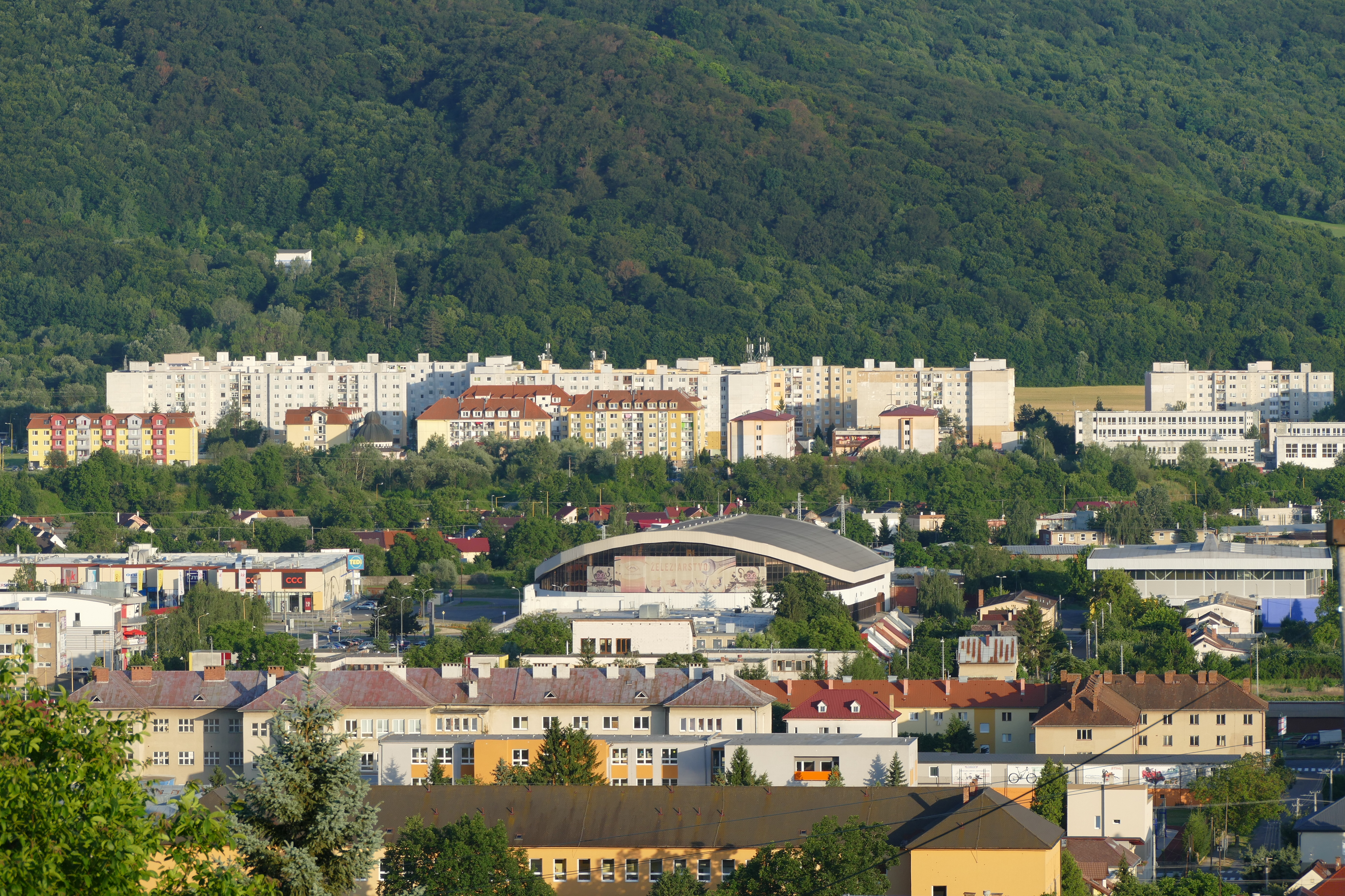 Pohľad na mesto Humenné od severu, vzadu Sídlisko Pod Sokolejom